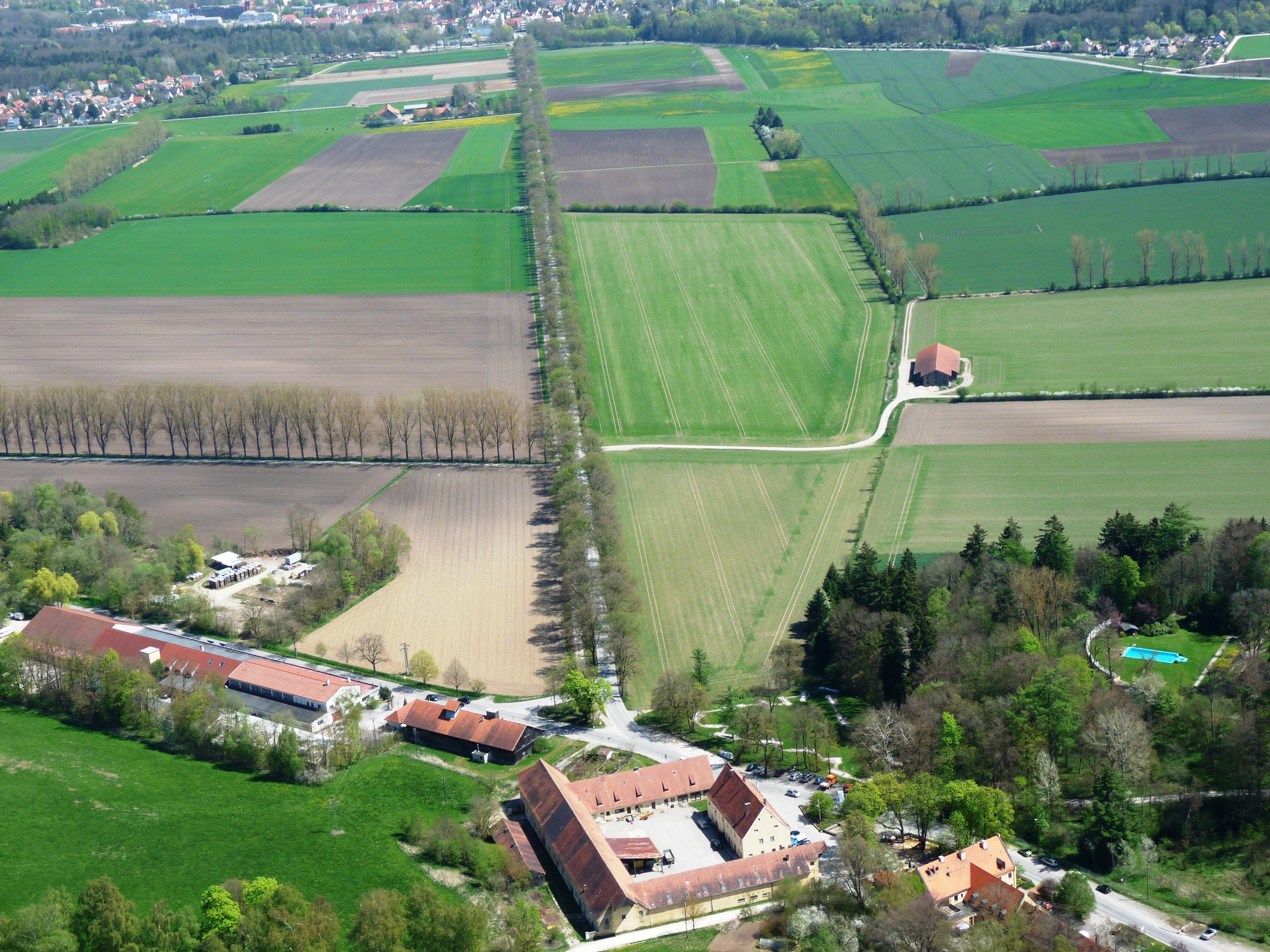 Wellenburger Allee 100428